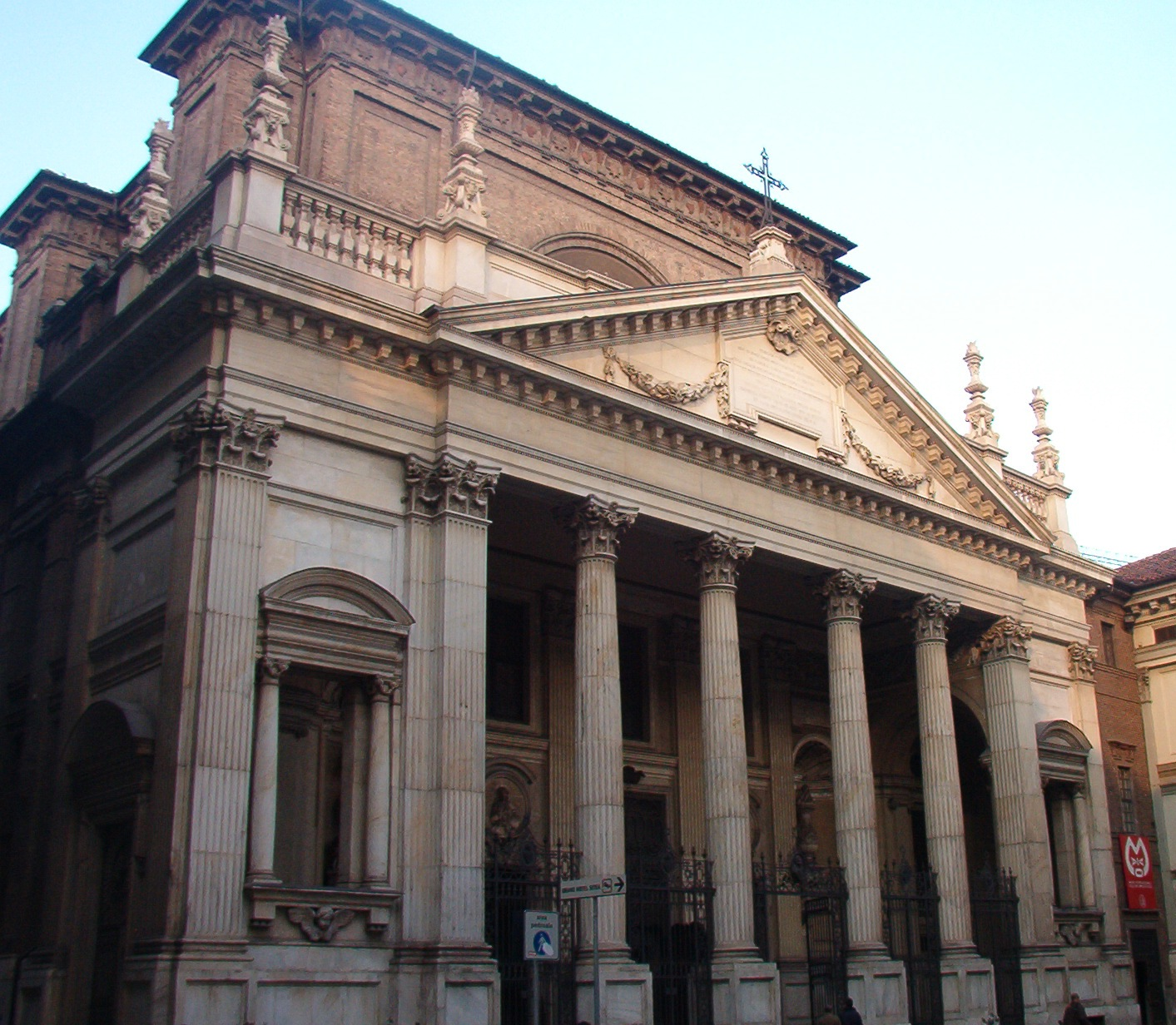 Chiesa di san Filippo Neri - Torino - Italia